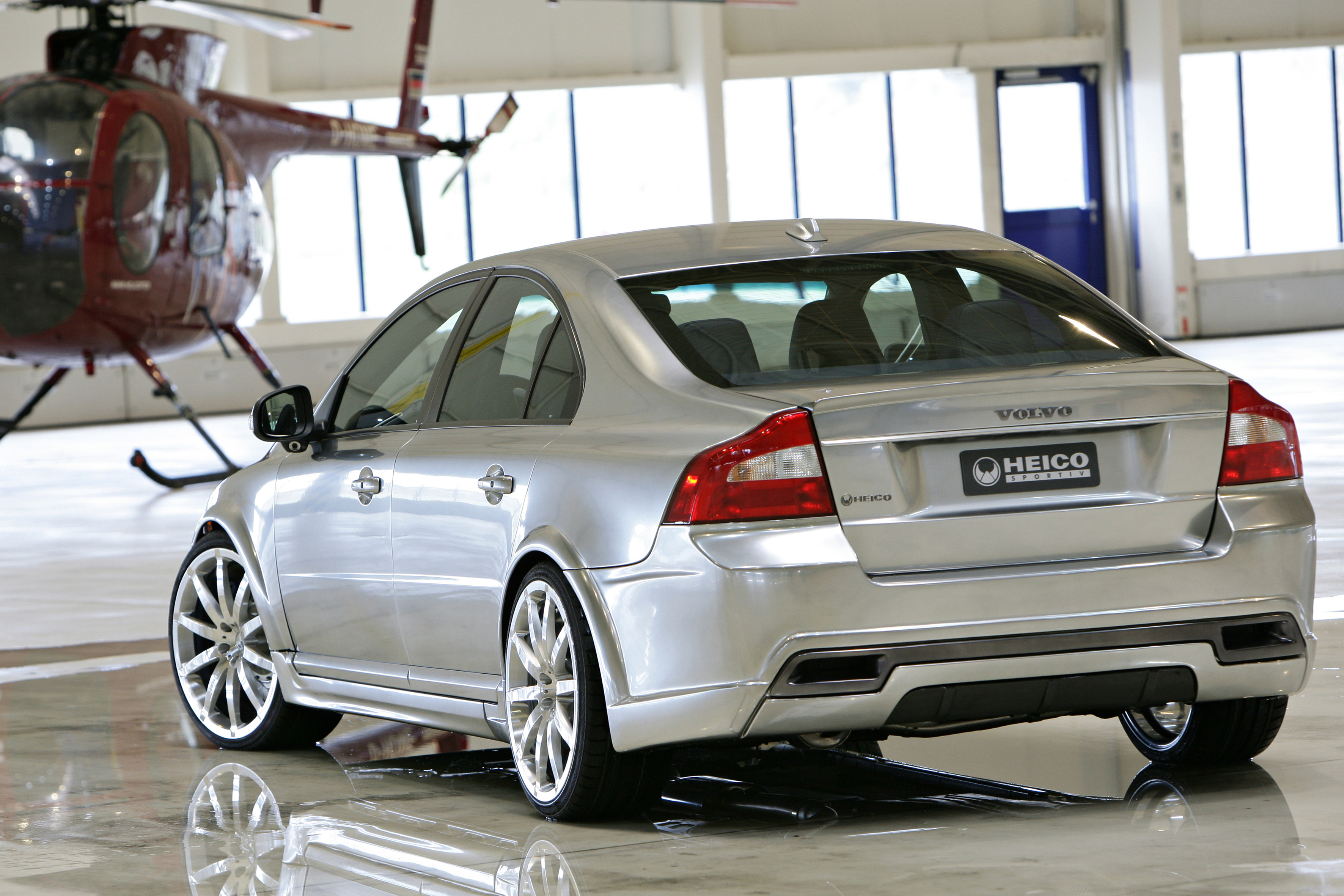 ConceptCar "HEICO HS8 HPC" auf Basis des Volvo S80 T6